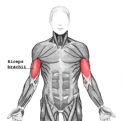 Der Musculus biceps brachii ist ein Muskel an der Vorderseite des Oberarms.